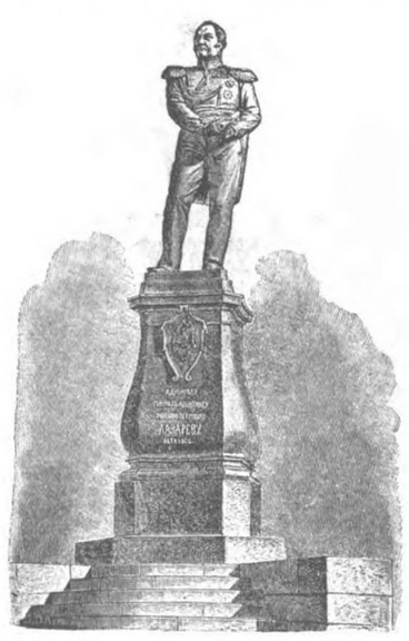 Памятник Лазареву. Гравюра